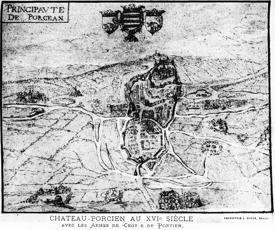 image extraite de "CHRONIQUE DE JEAN TATÉ GREFFIER DE L'HOTEL-DE-VILLE DE CHATEAU-PORGIEN (1677-1748)".